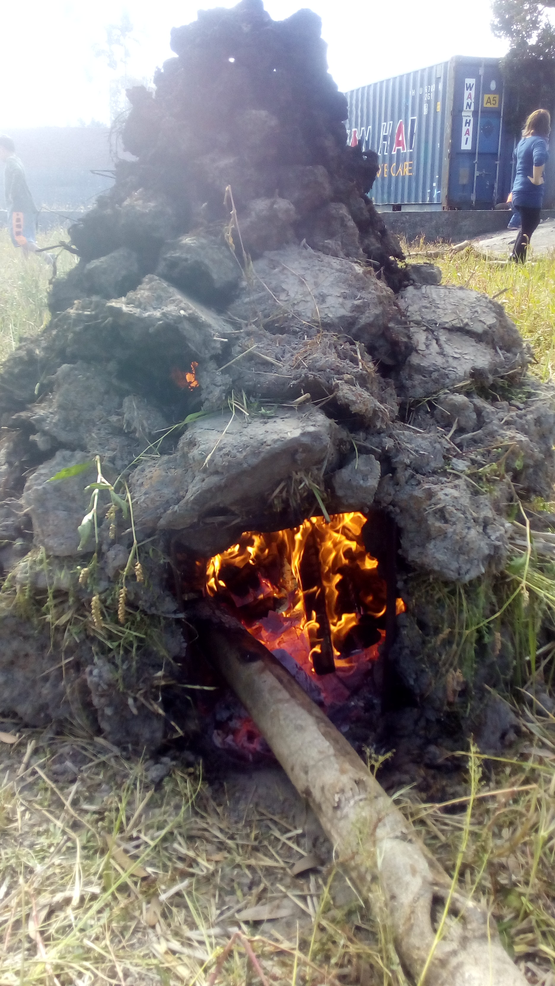 中文（台灣）: 這是焢窯中的燒窯步驟。